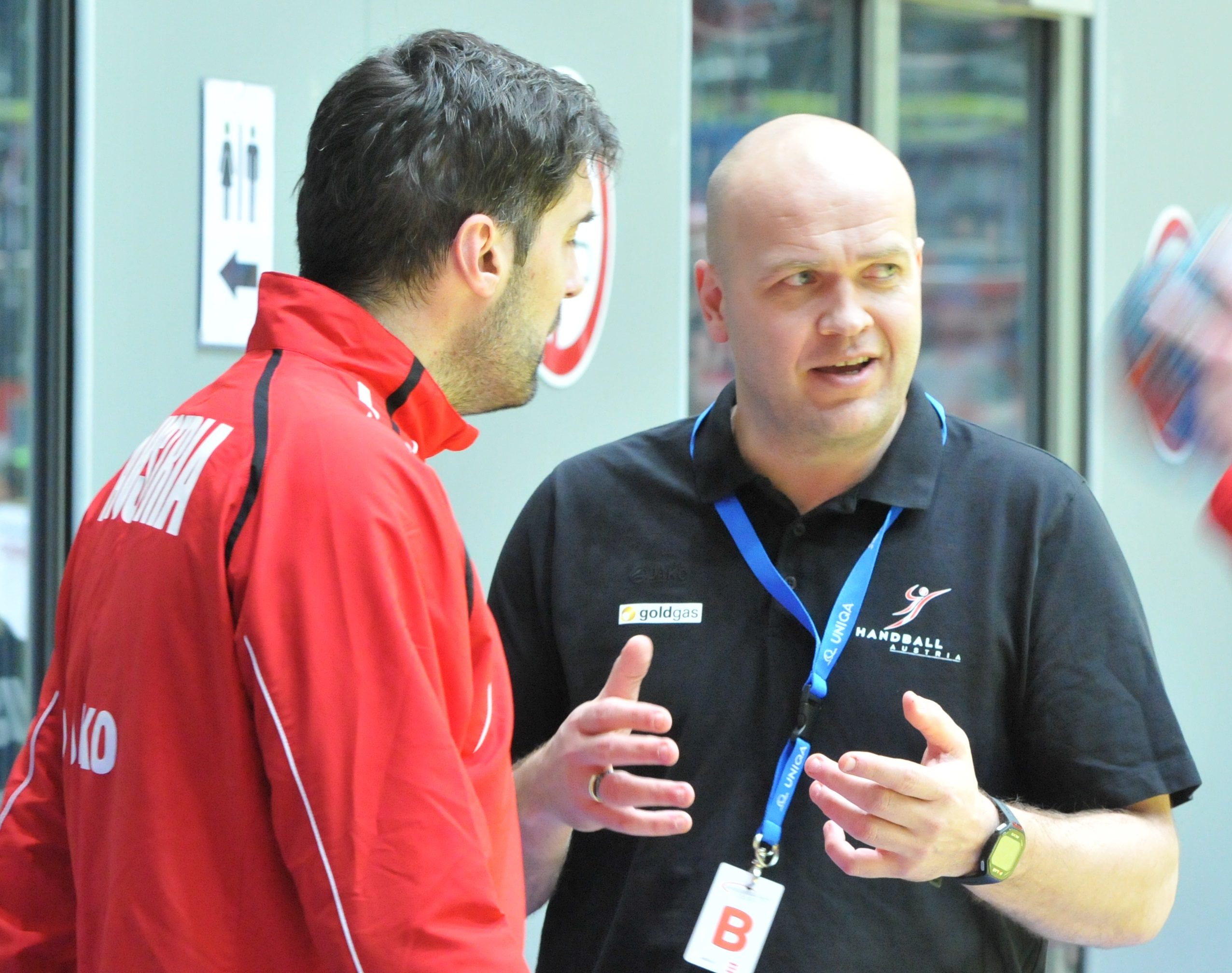 Nikola Marikovic und Patrekur Jóhannesson vor dem Handball-Freundschaftsspiel zwischen Österreich und Deutschland am 4. März 2014